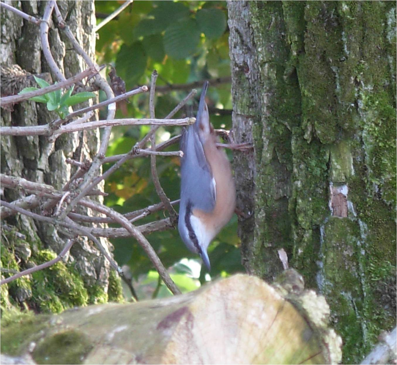 Kleiber Sitta europaea läuft kopfüber einen Baumstamm hinunter. Schweiz.